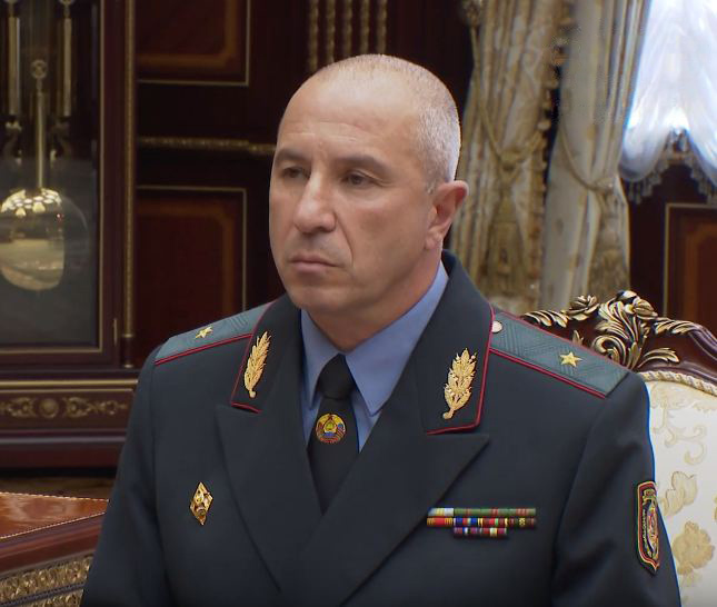 Юрый Караеў